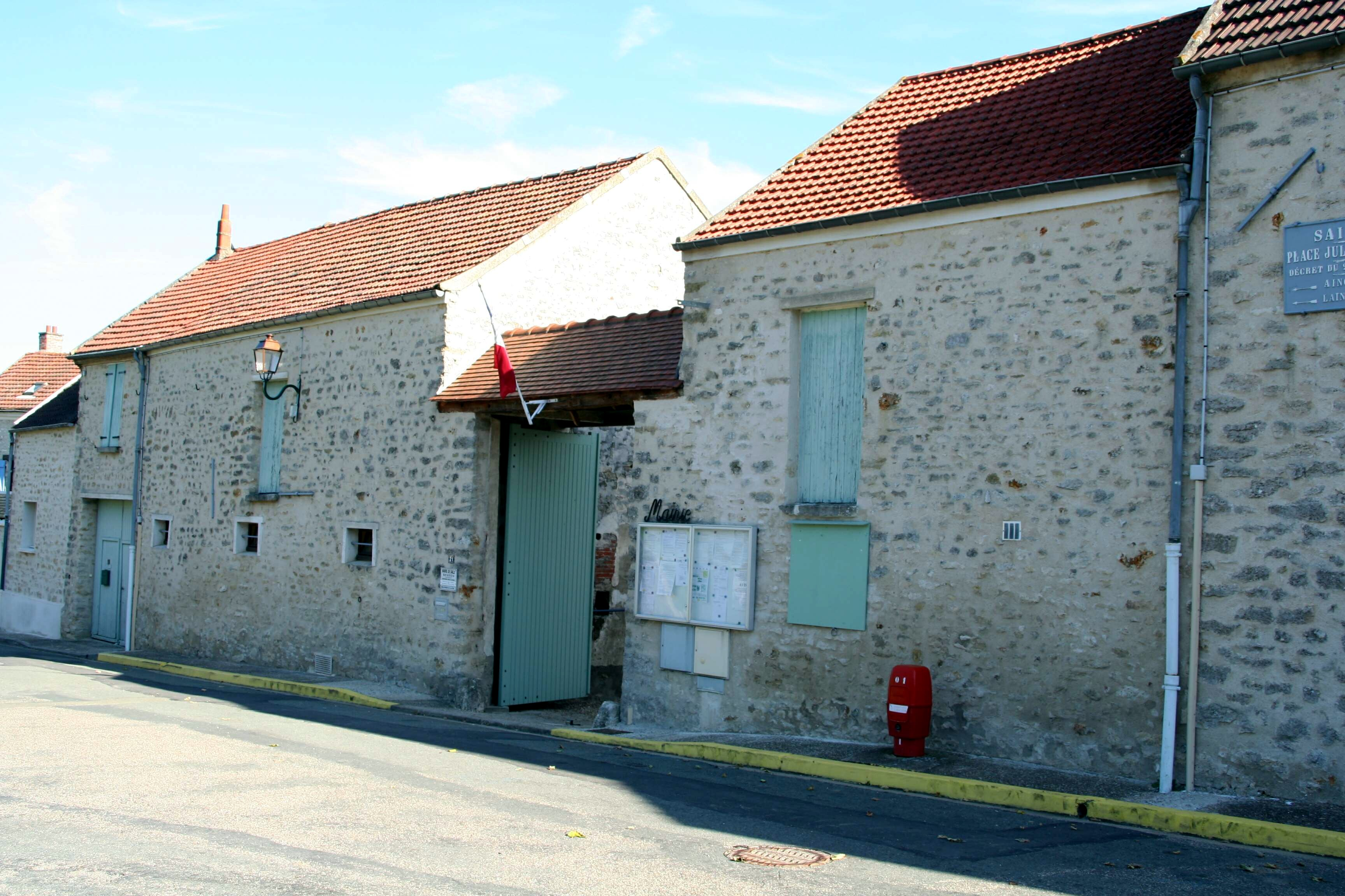 Mairie de Sailly - Yvelines (France)